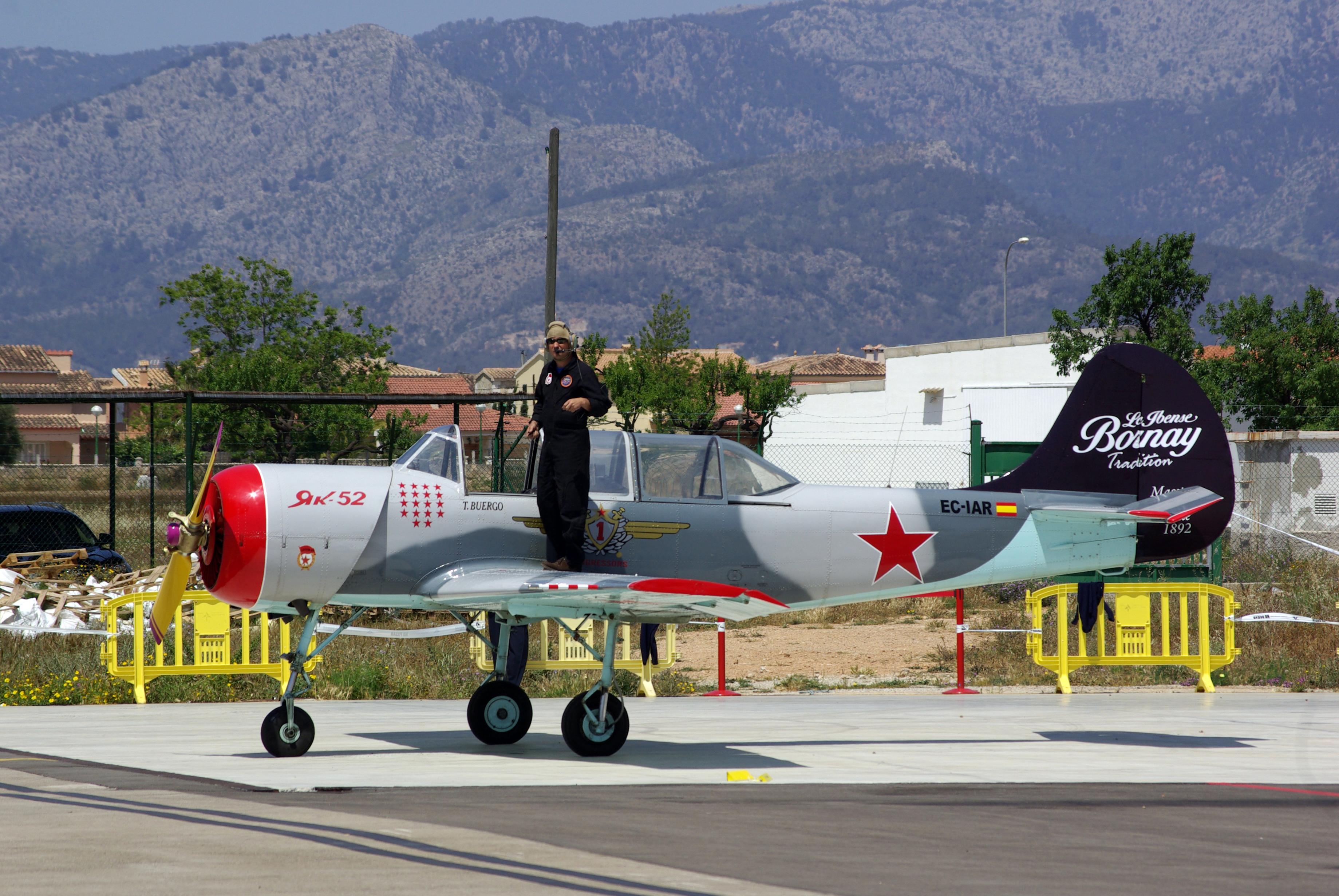 El Yak-52 matrícula EC-IAR, perteneciente a la Asociación Deportiva Jacob 52, estacionado en el aeródromo de Son Bonet, en la primera jornada del Malloryak 2008.